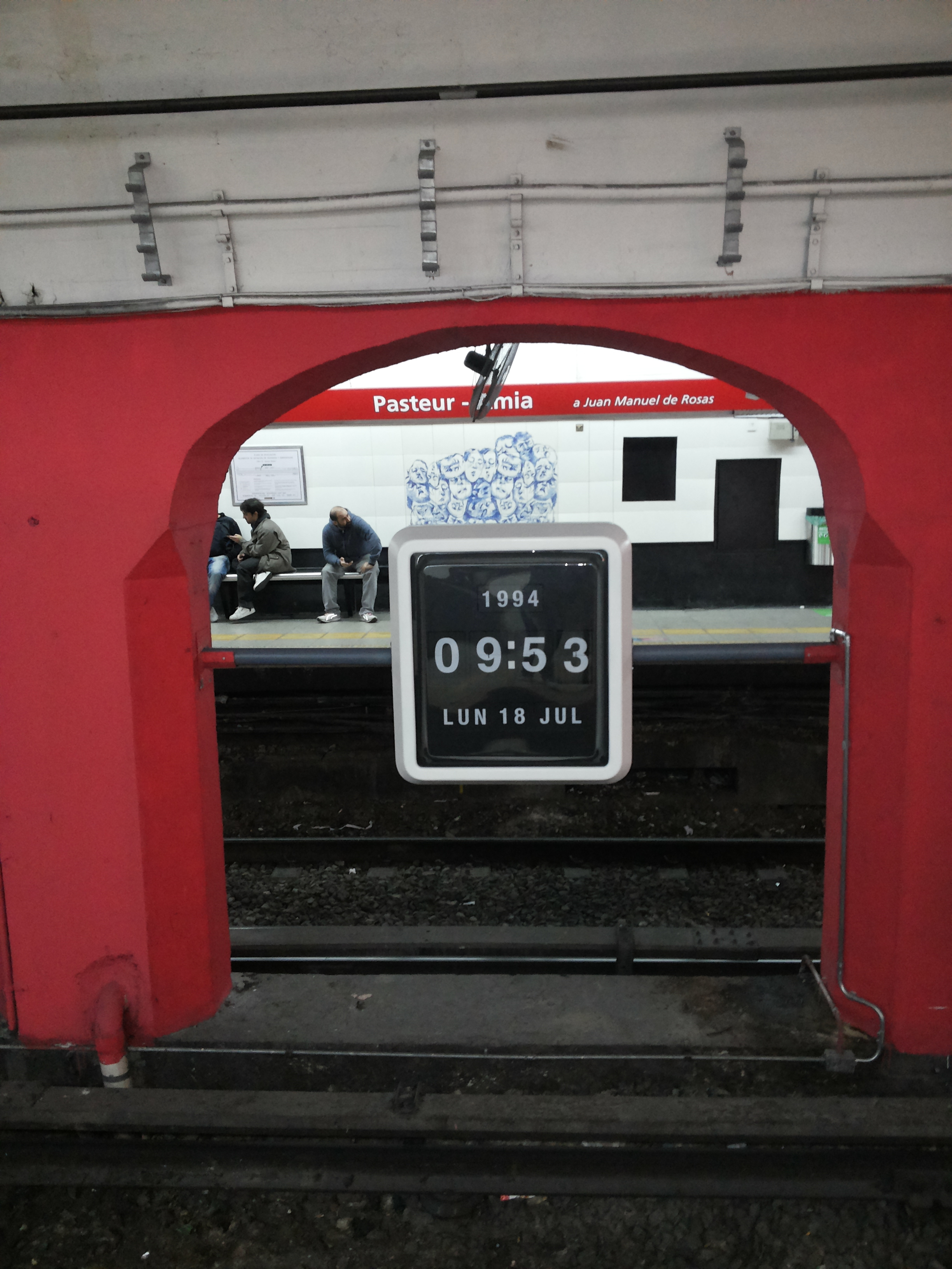 Estación Pasteur - AMIA de la línea B del Subte de Buenos Aires, el 18 de julio de 2015 a 21 años del atentado a la AMIA.